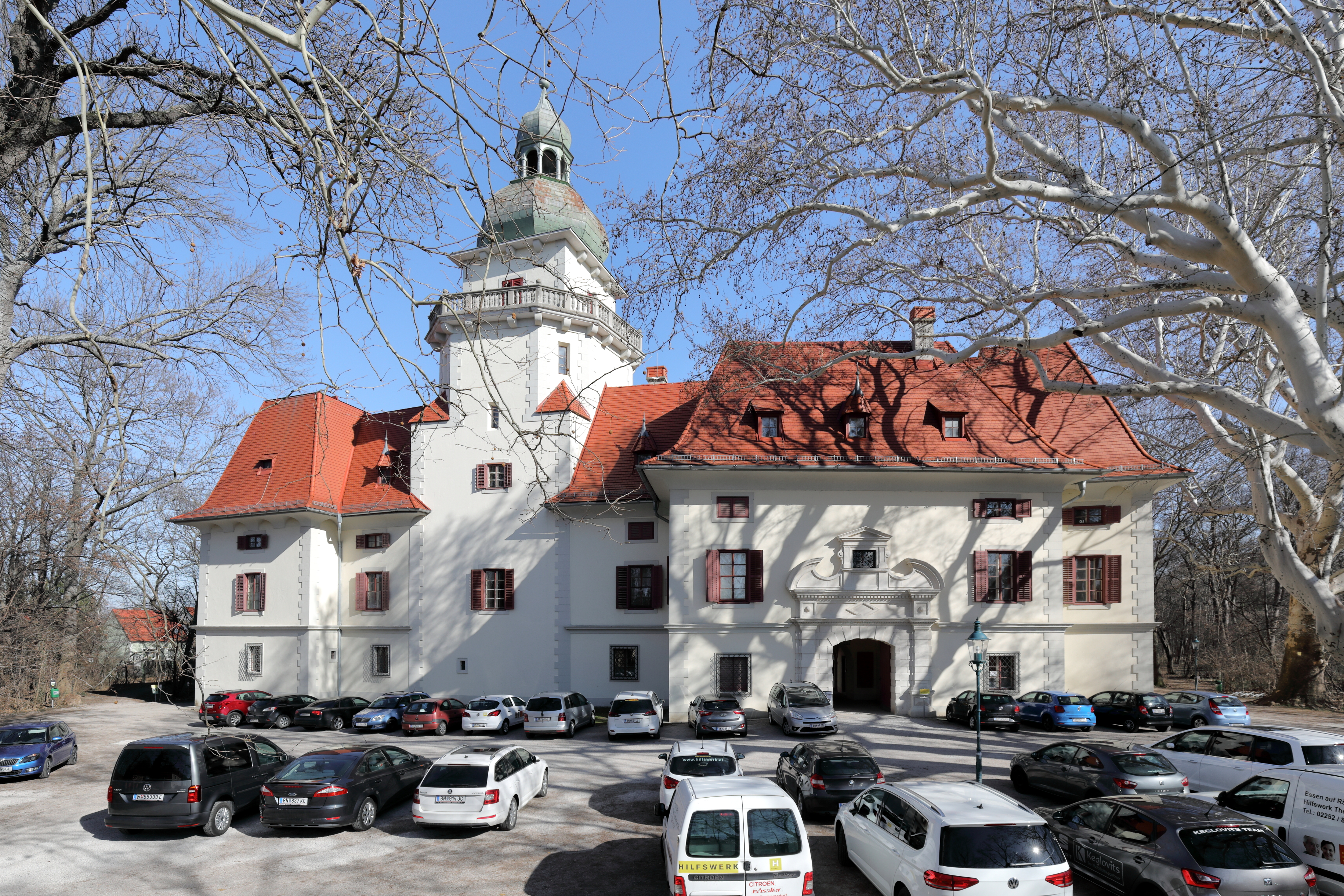 Westansicht des Schlosses in Tribuswinkel, ein Ortsteil in der niederösterreichischen Stadtgemeinde Traiskirchen. Die vierflügelige Anlage über trapezförmigem Grundriss war ursprünglich eine Burg. Im 17 Jahrhundert wurde sie zu einem Wasserschloss umgebaut und im 19./20. Jahrhundert erfolgten weitere Umgestaltungen.